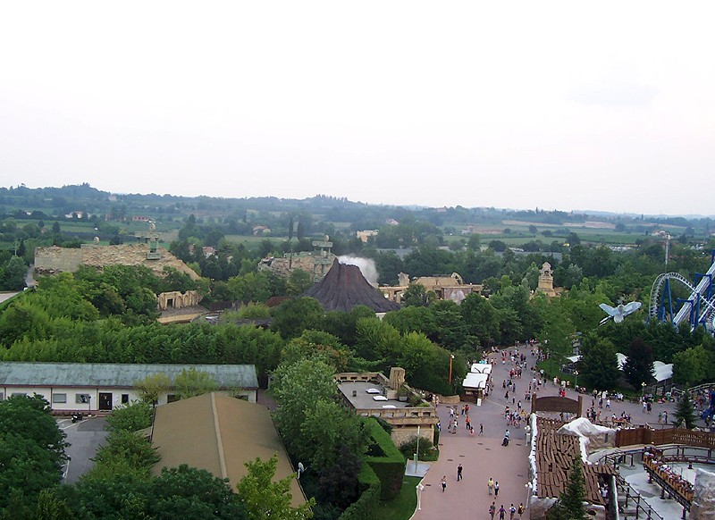 Panorama di Gardaland dal Flying Island